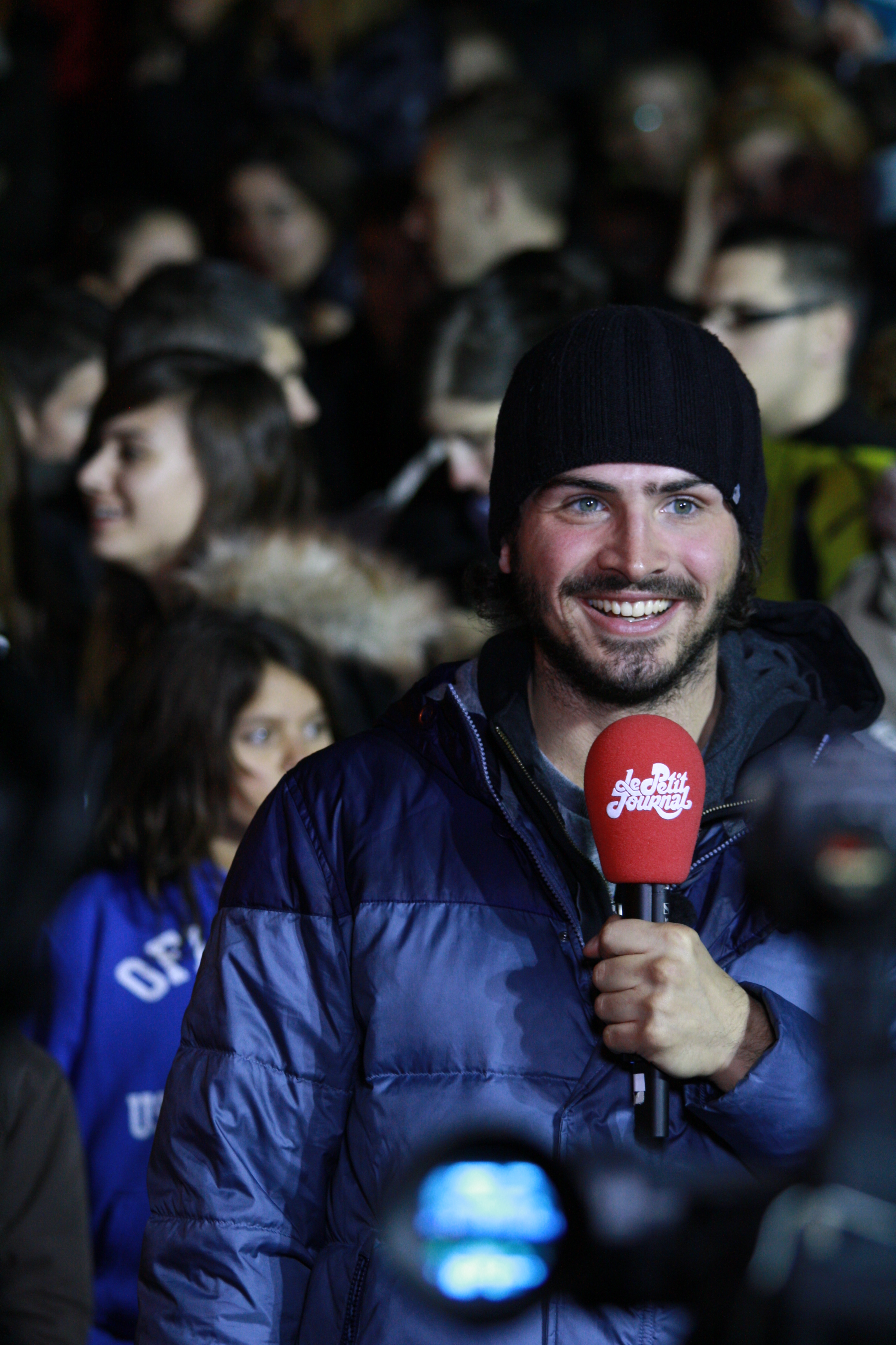 Le chroniqueur Maxime Musqua réalise un duplex depuis Tournus avec Le Petit journal de Canal+, dans le cadre de sa marche pour l'égalité et contre le racisme.